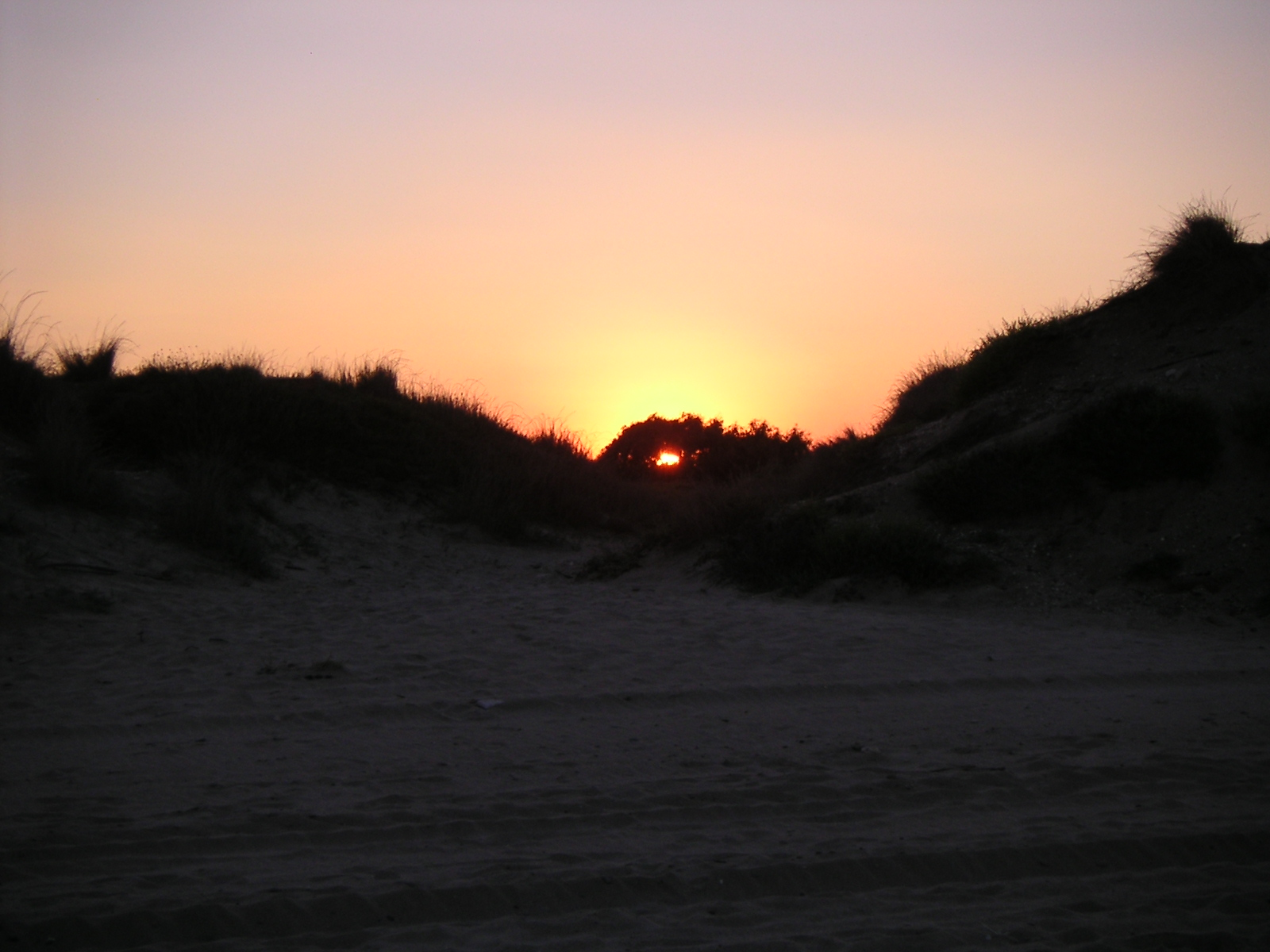 Sunset at "El Saler", Valencia (Spain)